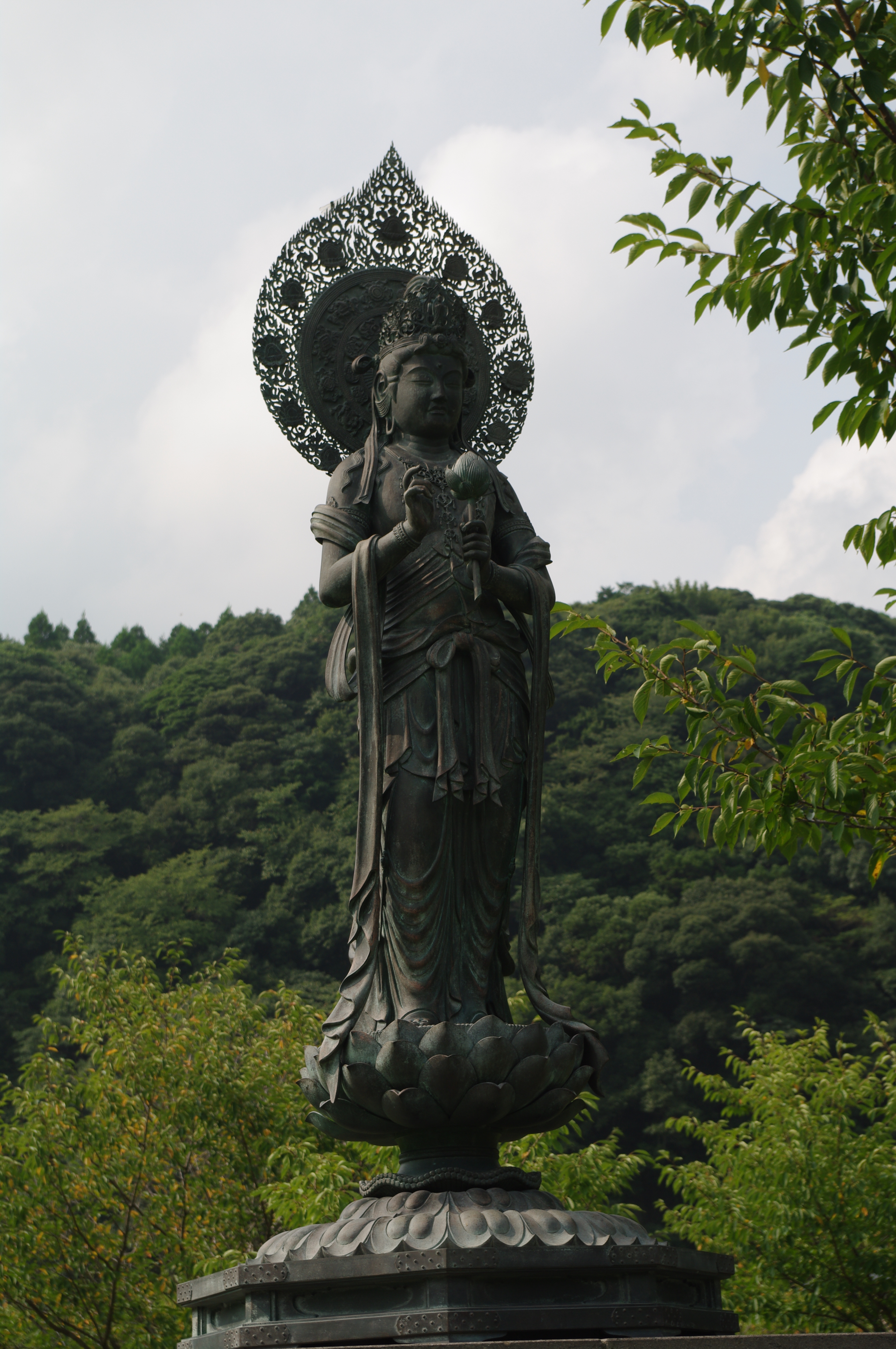 清水岩屋公園の仏像